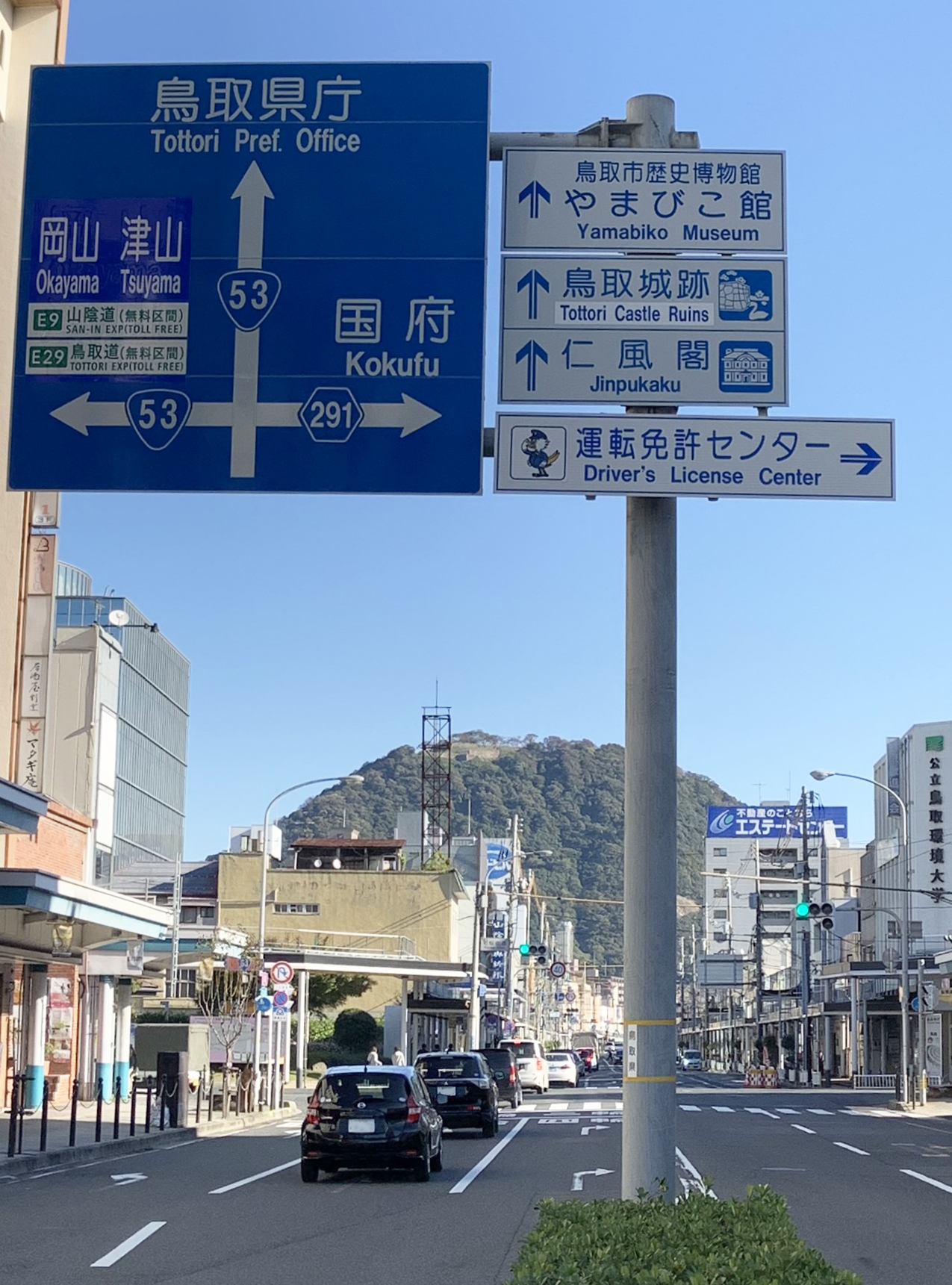 JR鳥取駅北側、県道25号線から見た久松山（鳥取城跡）。2019年11月6日朝に撮影。